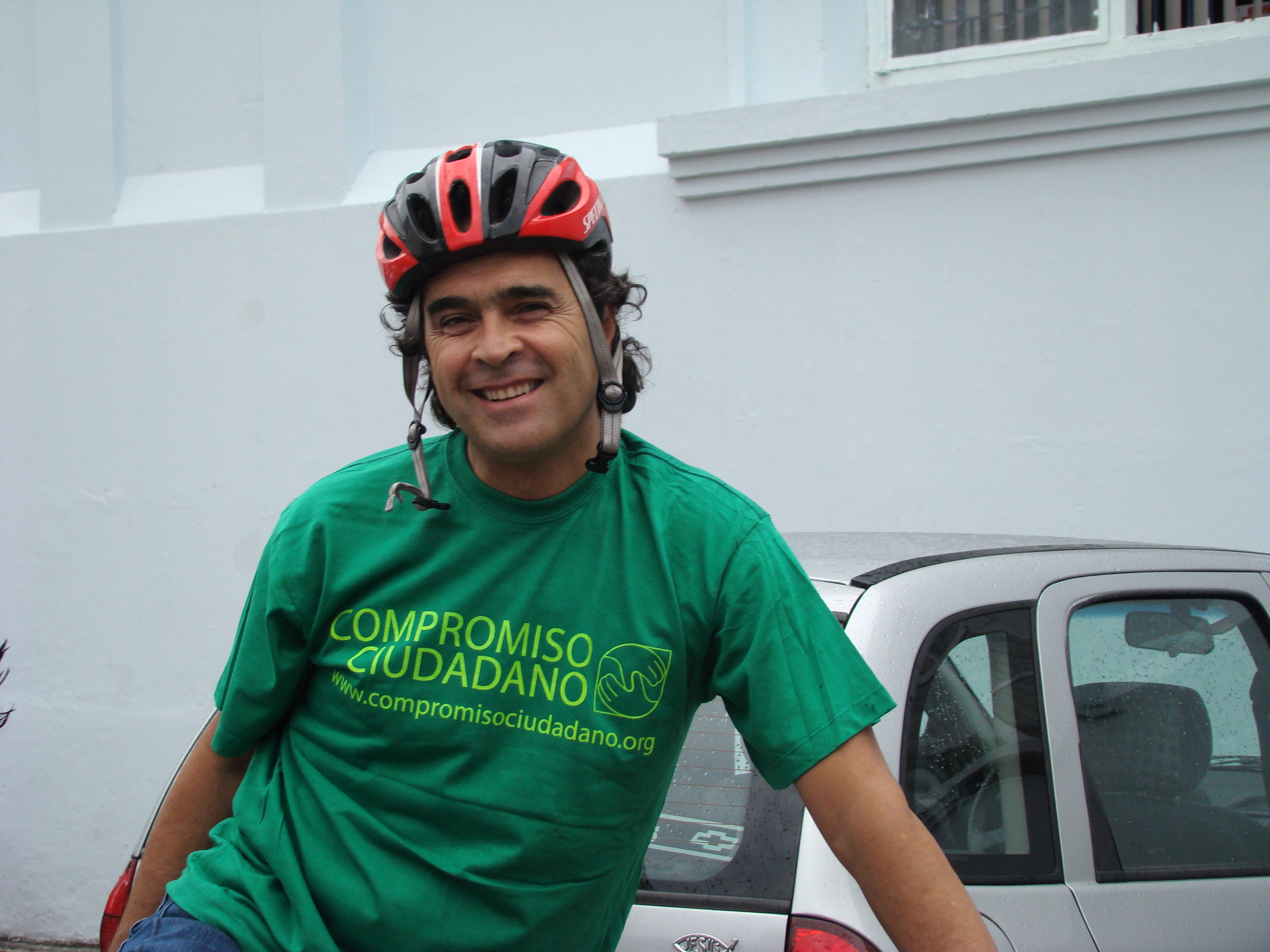 Sergio Fajardo montando en bicicleta por las calles de Bucaramanga, Colombia